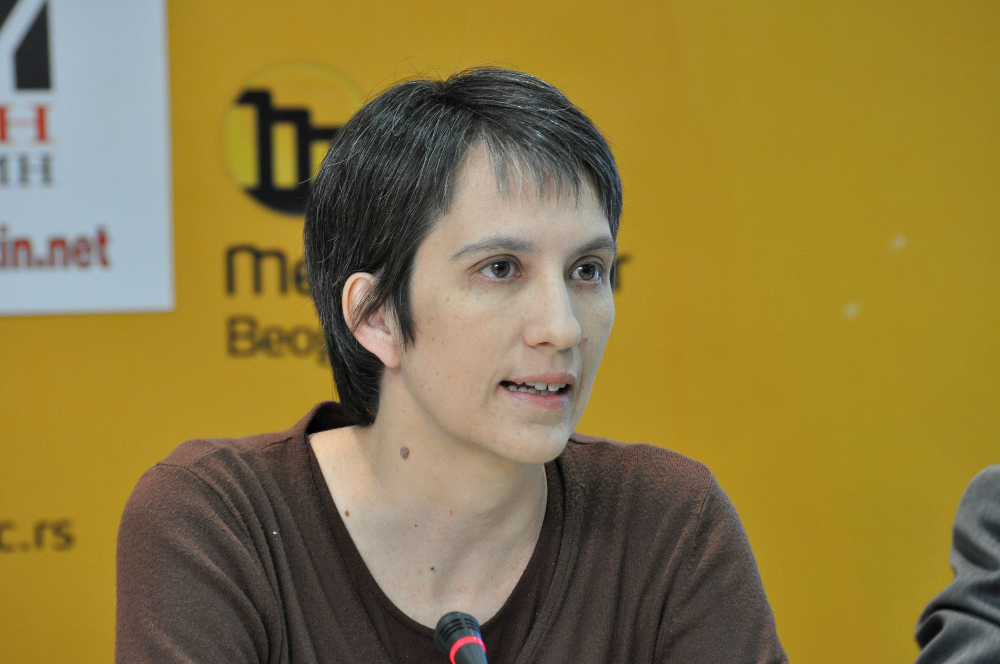 Александра Смиљанић српска научница